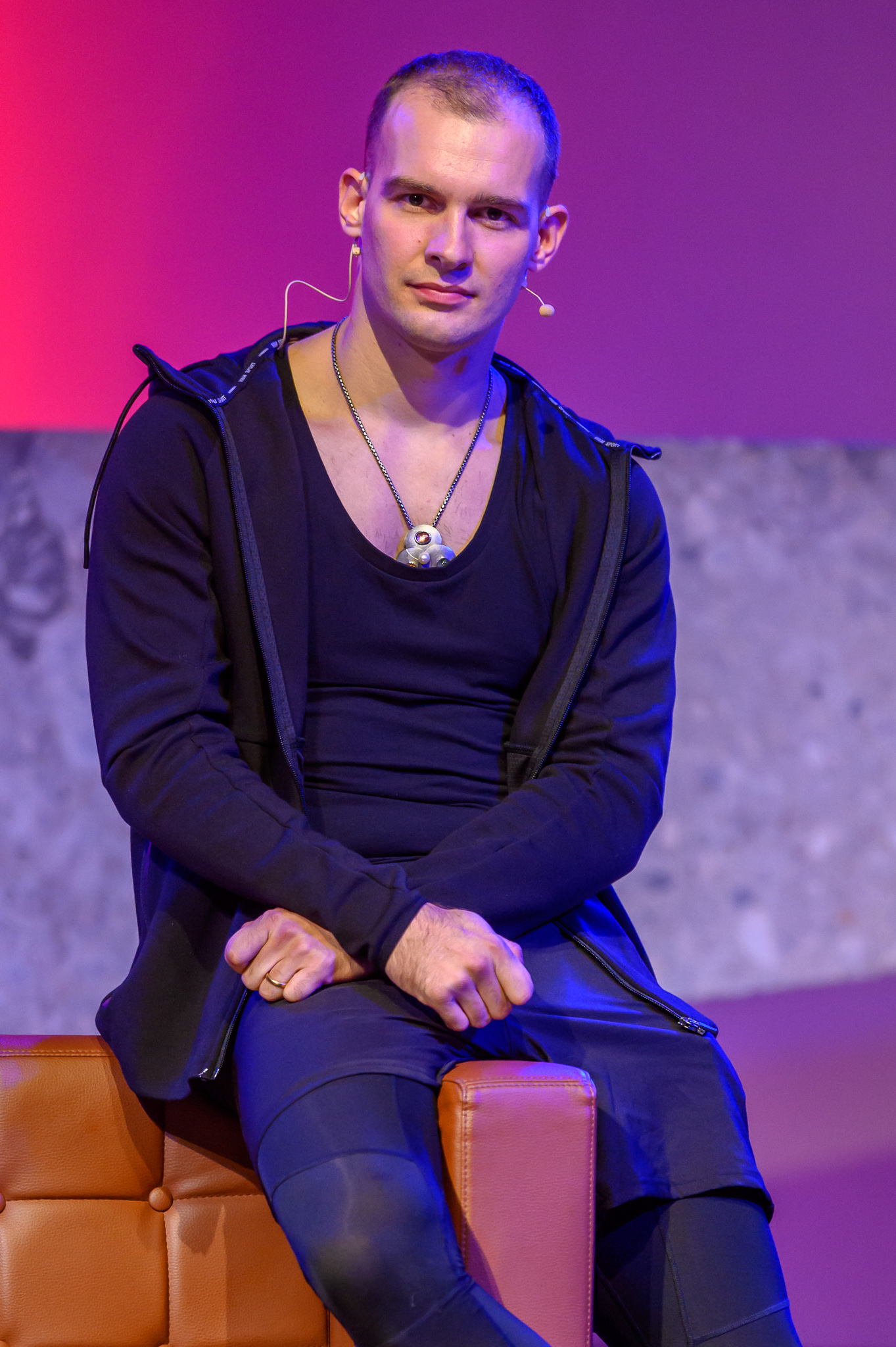 9 Tage wach - Der Sprachtrip,Concertbüro Franken,Eric Stehfest,LUX – Junge Kirche Nürnberg